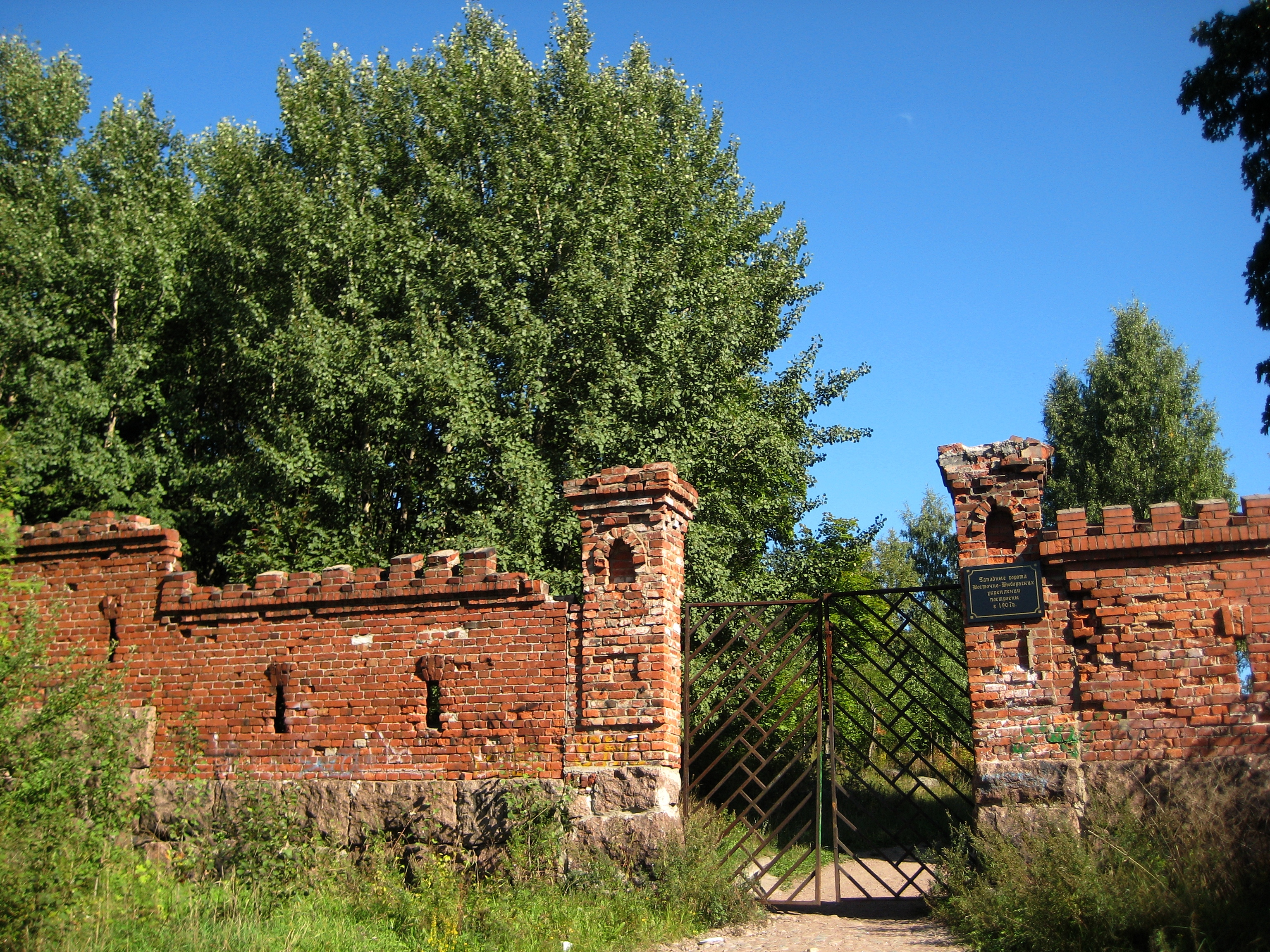 Выборг. Восточно-выборгские укрепления на Батарейной горе. Стены и ворота.